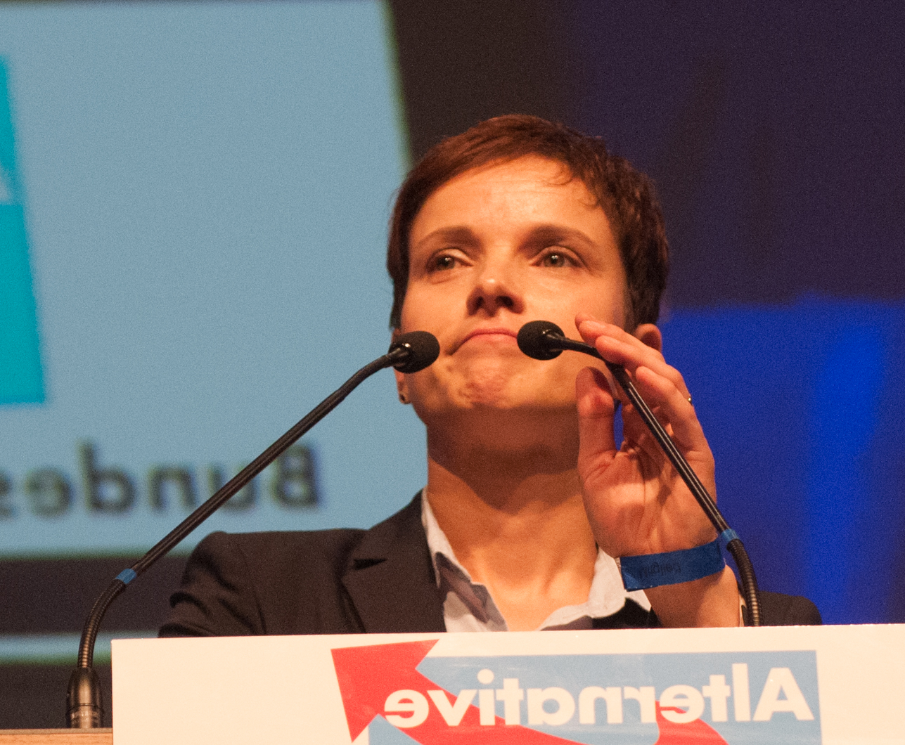 a.o. Bundesparteitag der Alternative für Deutschland, 4. Juli 2015 in Essen, Gruga Halle a.o. Bundesparteitag der Alternative für Deutschland am 4./5. Juli 2015 in Essen, Gruga Halle